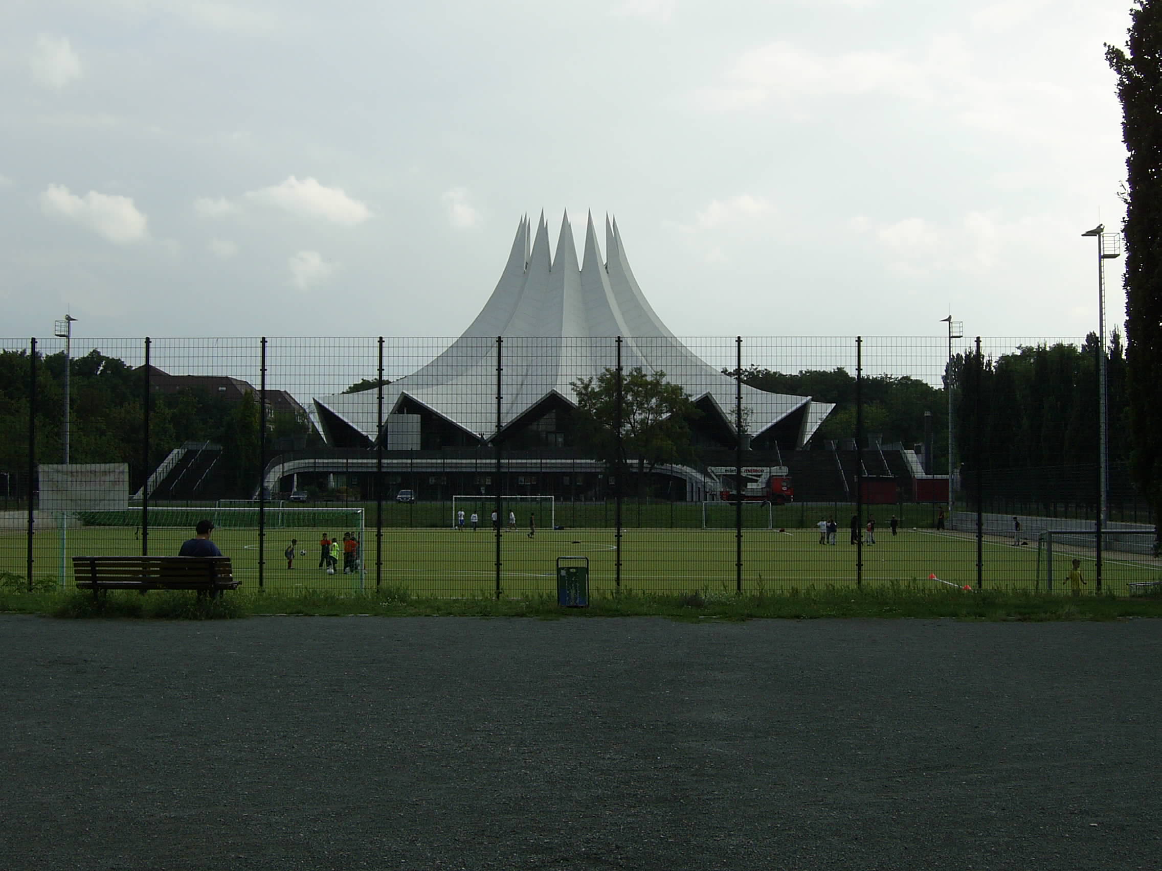 Tempodrom